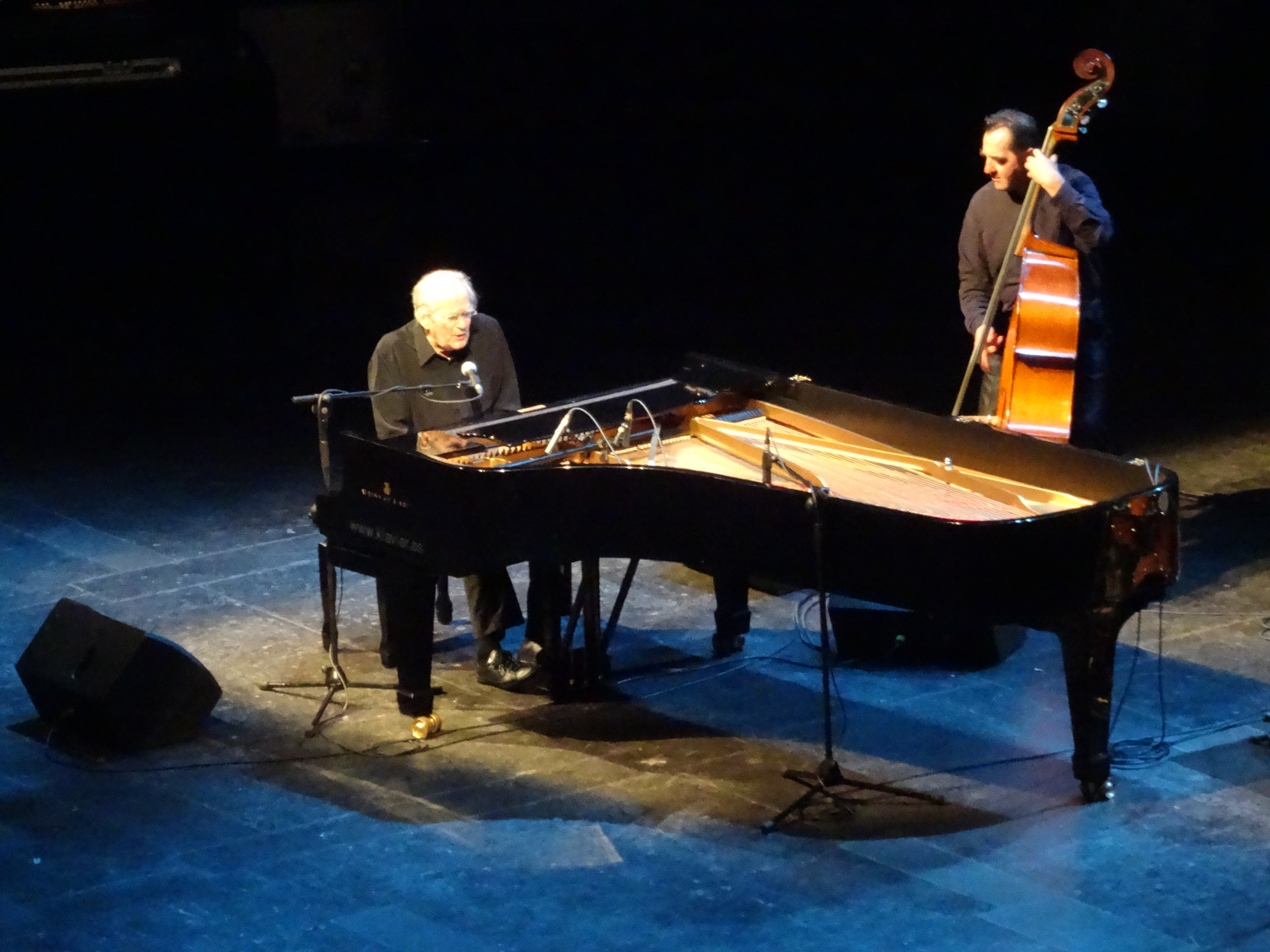 Michel Legrand, concierto de clausura de la XX edición del Festival Internacional de Jazz de San Javier (30 de julio de 2017)